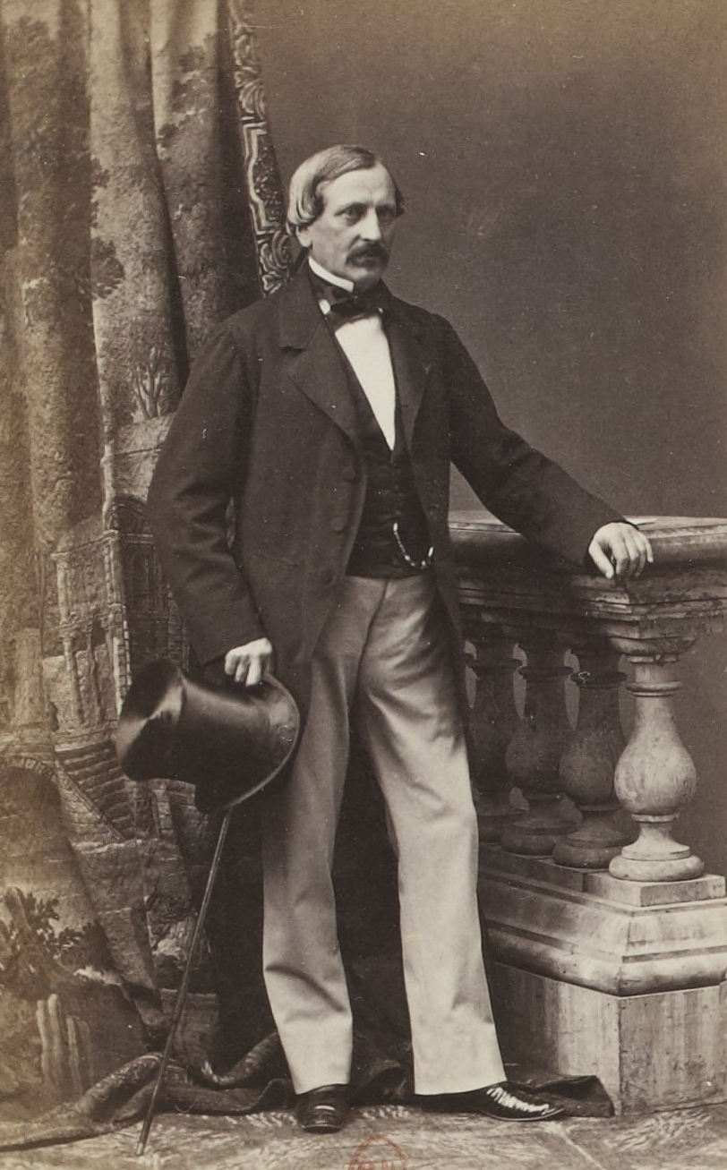 Album des députés au Corps législatif entre 1852-1857.